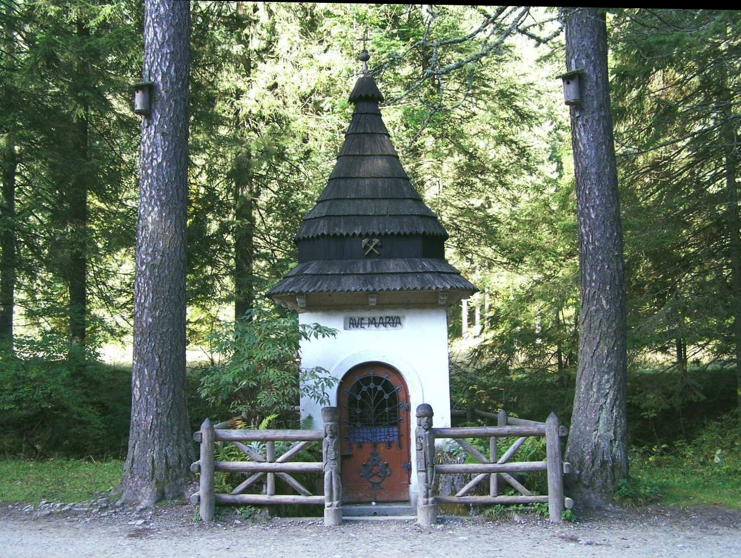 Kapliczka hutników w Dolinie Kościeliskiej